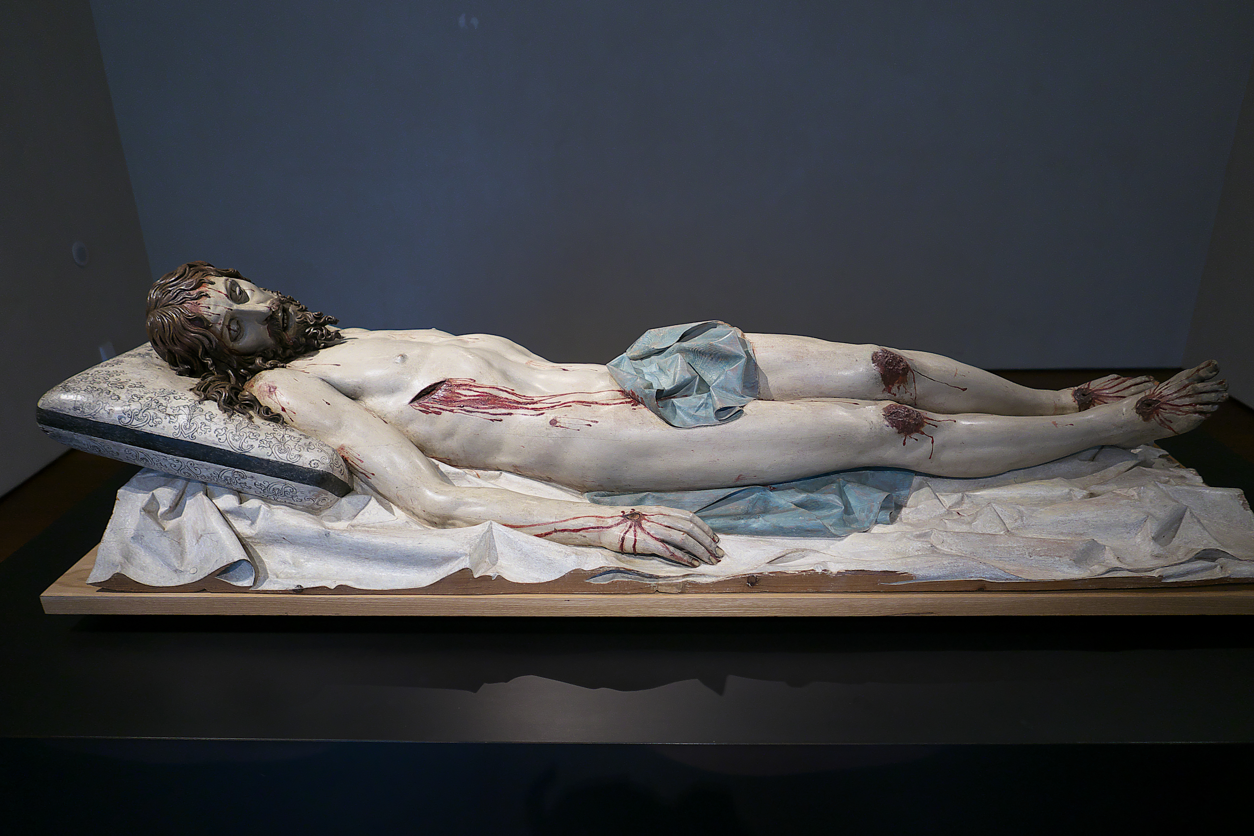 Museo Nacional de Escultura. Gregorio Fernández talla en madera policromada (1625-1630) otro Cristo yacente, ésta ya mas naturalista, para la Casa Profesa de los jesuitas en Madrid